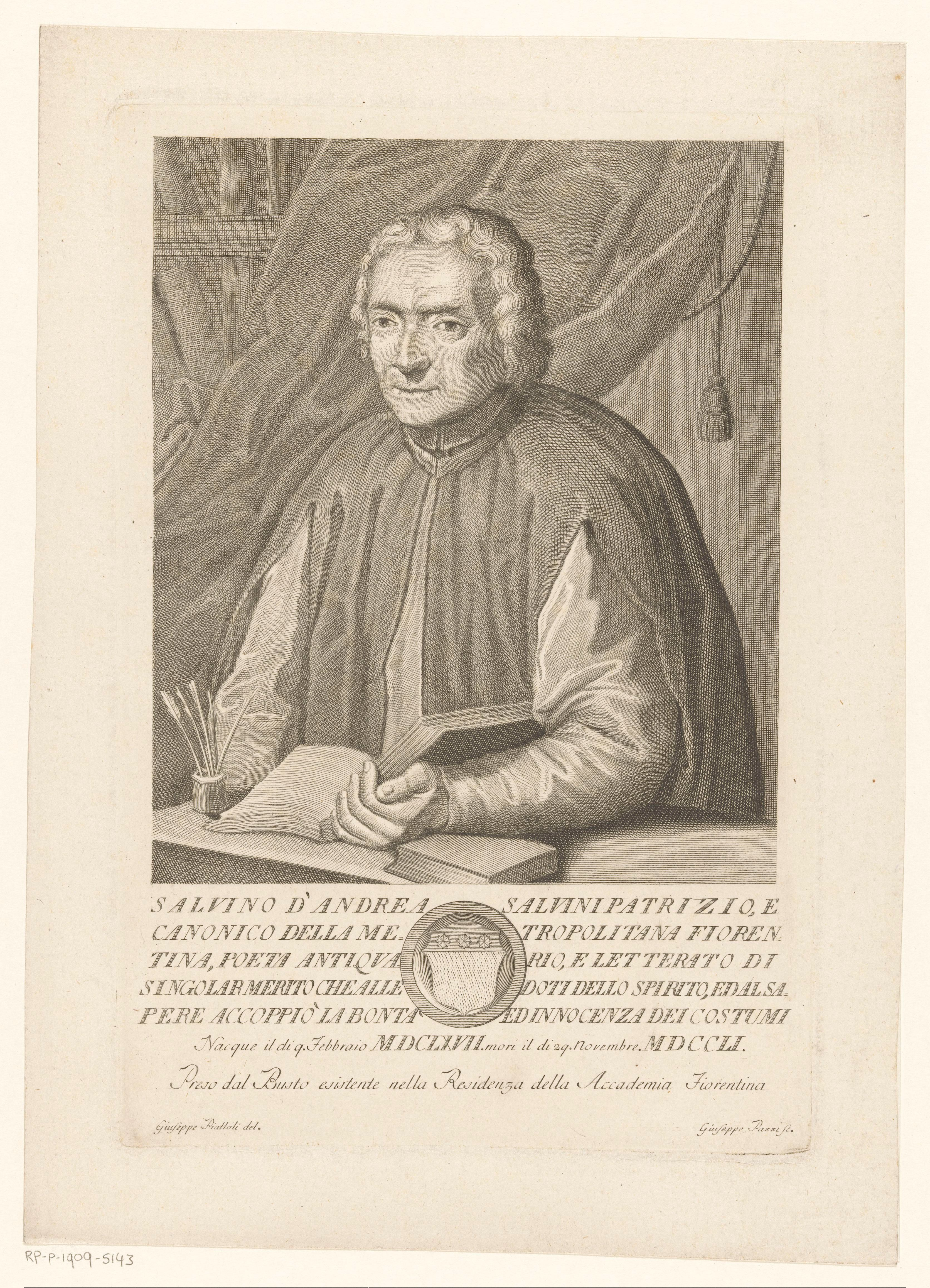 IdentificatieTitel(s): Portret van dichter en humanist Salvino SalviniObjecttype: prent Objectnummer: RP-P-1909-5143Opschriften / Merken: verzamelaarsmerk, verso, gestempeld: Lugt 2228Omschrijving: In de ondermarge een wapenschild en een tekst in het Latijn.VervaardigingVervaardiger: prentmaker: Giuseppe Pazzi (vermeld op object)naar tekening van: Giuseppe Piattoli (vermeld op object)Plaats vervaardiging: prentmaker: Italiënaar tekening van: FlorenceDatering: 1843 - 1882Fysieke kenmerken: ets en gravureMateriaal: papier Techniek: graveren (drukprocedé) / etsenAfmetingen: plaatrand: h 298 mm × b 200 mmOnderwerpWat: historical personsWie: Salvino SalviniVerwerving en rechtenVerwerving: aankoop 1905Copyright: Publiek domein